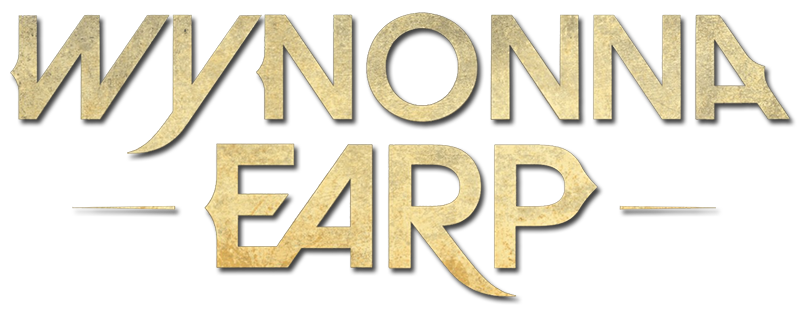 Logo de la série.